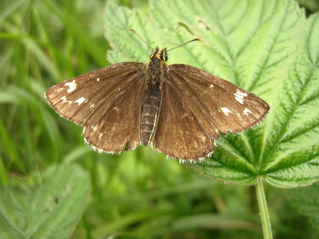 Spiegelfleck-Dickkopffalter Heteropterus morpheus. Fundort: Stadtwald Nauen, Brandenburg (Germany)